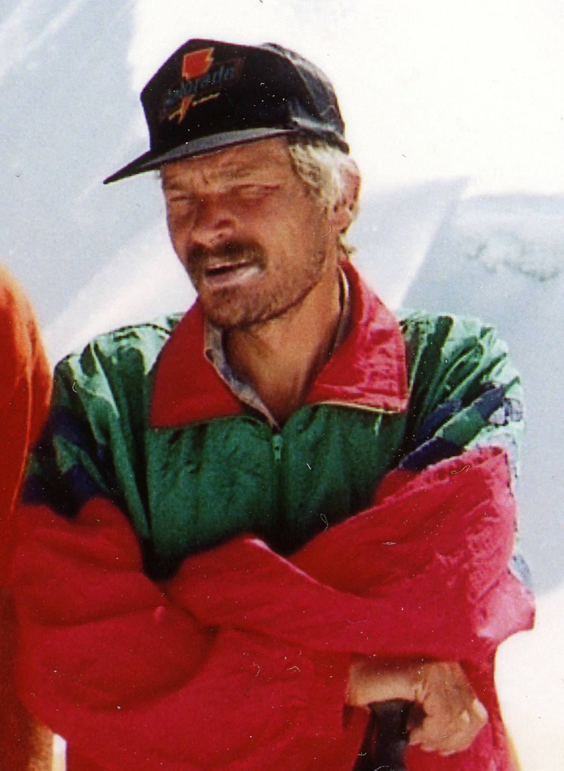 Tõivo Sarmet